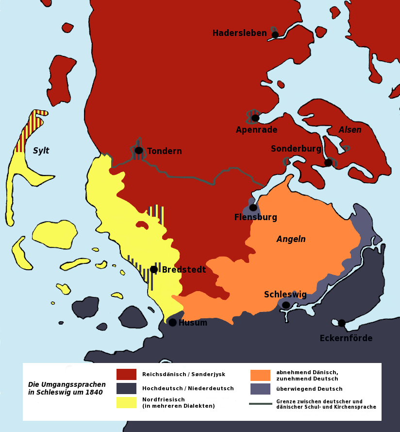 Sprachliche Verhältnisse in Schleswig um 1840, basierend auf der Karte "Sprachwandel in Schleswig 1840" des Historischen Atlas Schleswig-Holstein vom Mittelalter bis 1867, Neumünster 2004; unter Berücksichtigung historischer Karten aus dem 19. Jh.